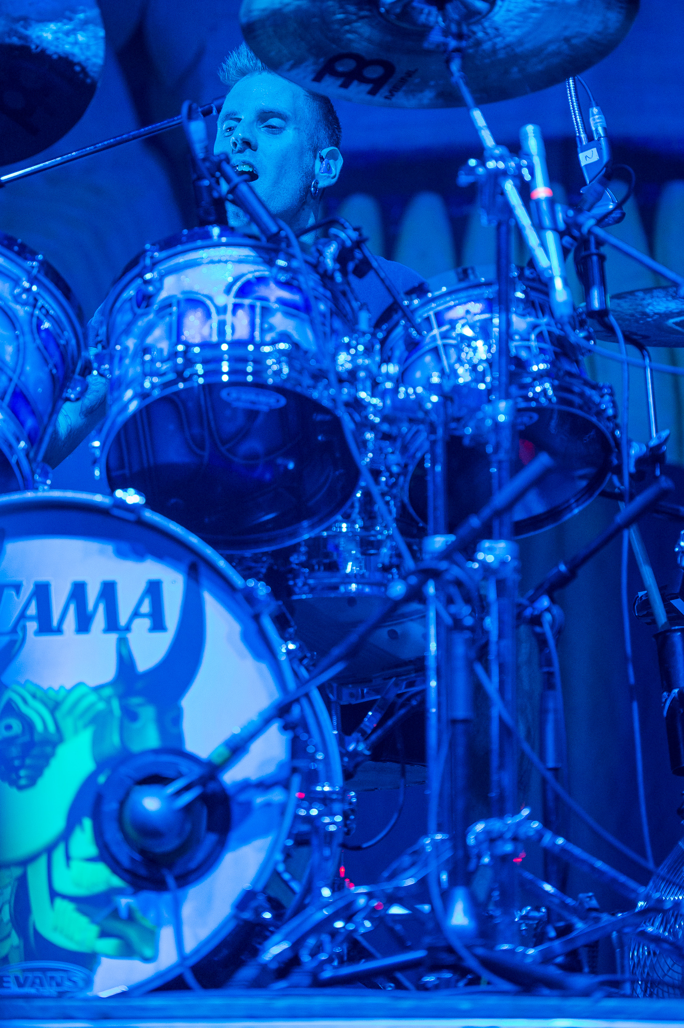 ARGO-Konzerte,Arena Nürnberger Versicherungen,Brann Dailor,Clubstage,Konzert,Livekonzert,Livemusik,Mastodon,Musik,RiP,Rock im Park 2014